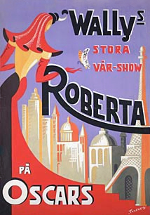 Programblad från Oscarsteatern för föreställningen Roberta